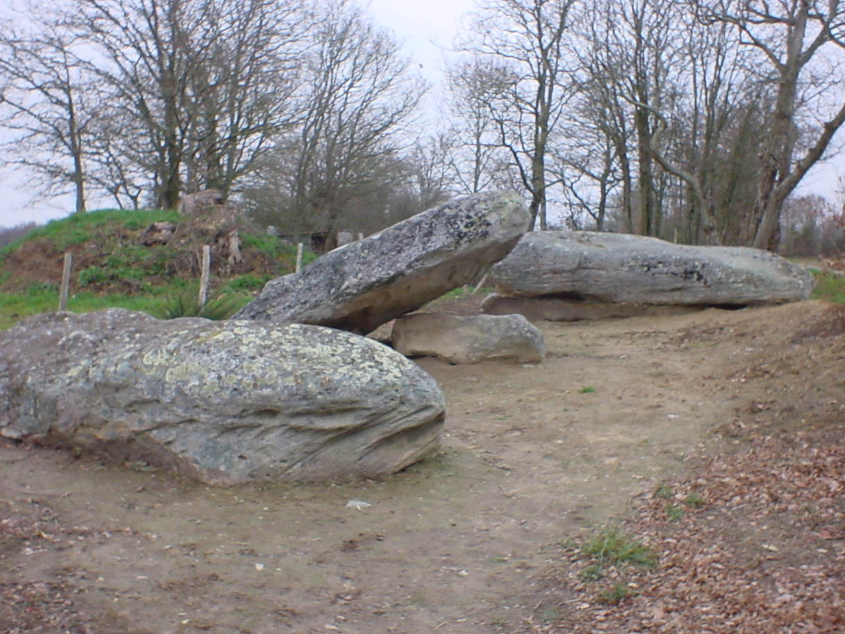 Pierre des Platennes, (Inscrit, 1989)